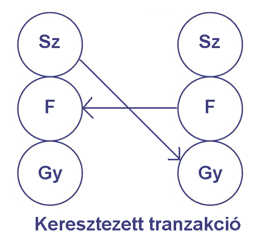 Keresztezett tranzakció a játszmaelméletben